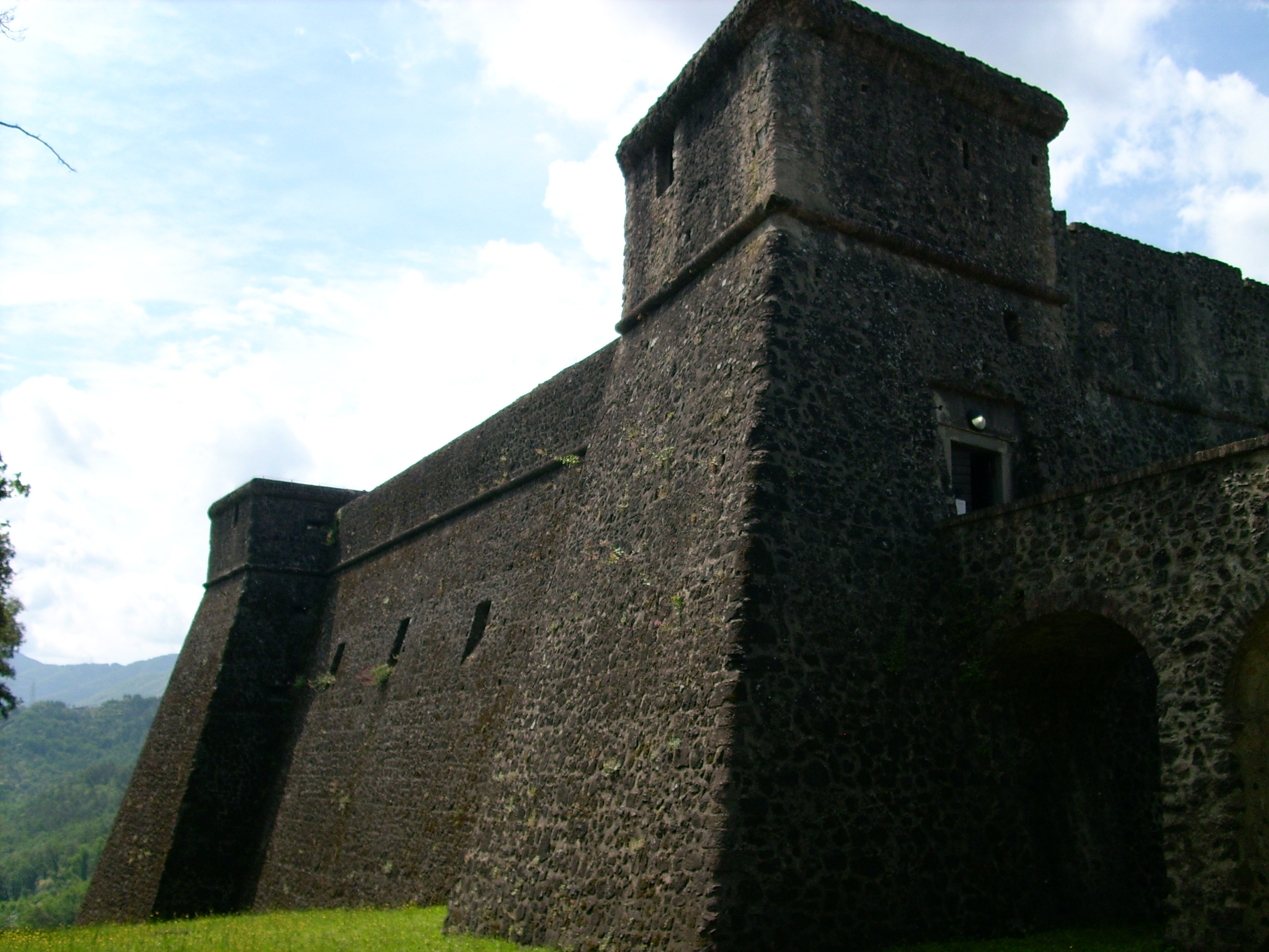 Fortezza della Brunella presso Aulla, Toscana, Italia